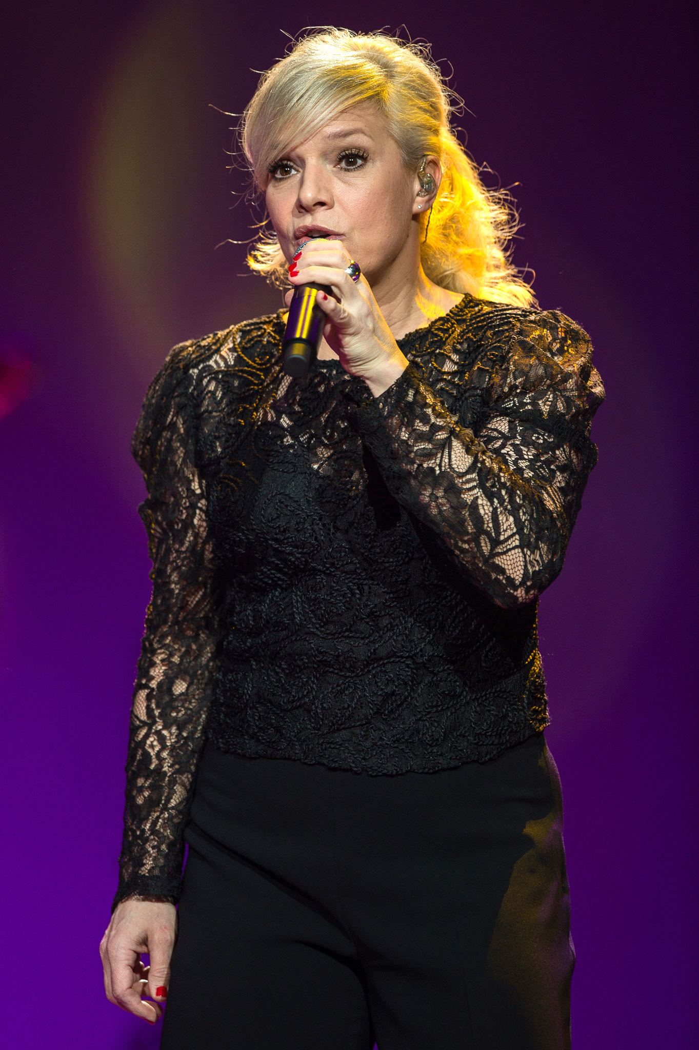 Arena Nürnberger Versicherungen,Concertbüro Franken,Ina Müller,Juhu-Tour 2017,Konzert,Livekonzert,Livemusik